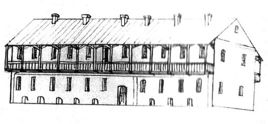 Беларуская (тарашкевіца): Сенна (Sienna). Кляштар францішканаў